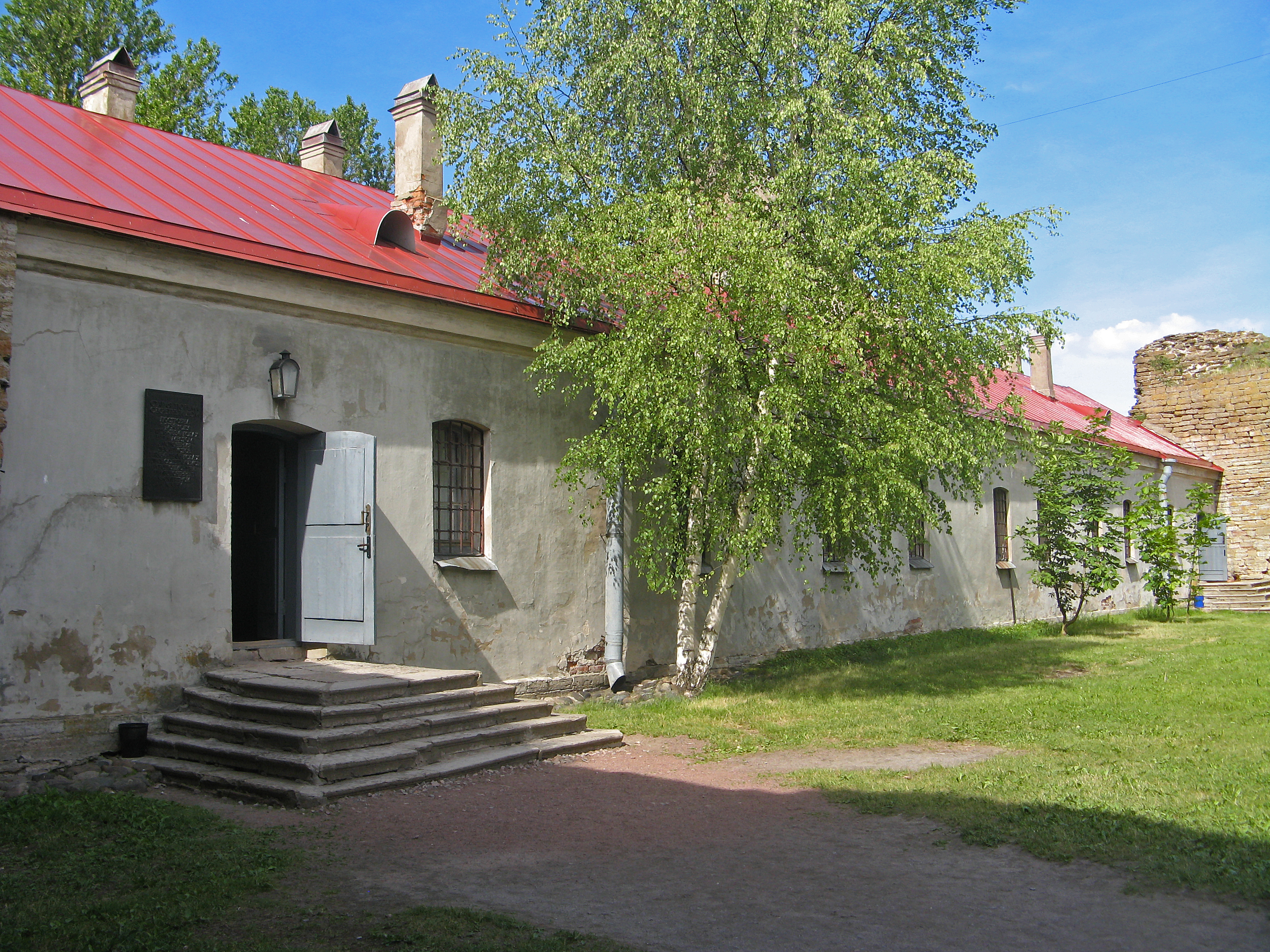 'Секретный дом' (Старая тюрьма): Ореховый остров, крепость Орешек, северная часть цитадели, Шлиссельбург, Кировский район, Ленинградская область